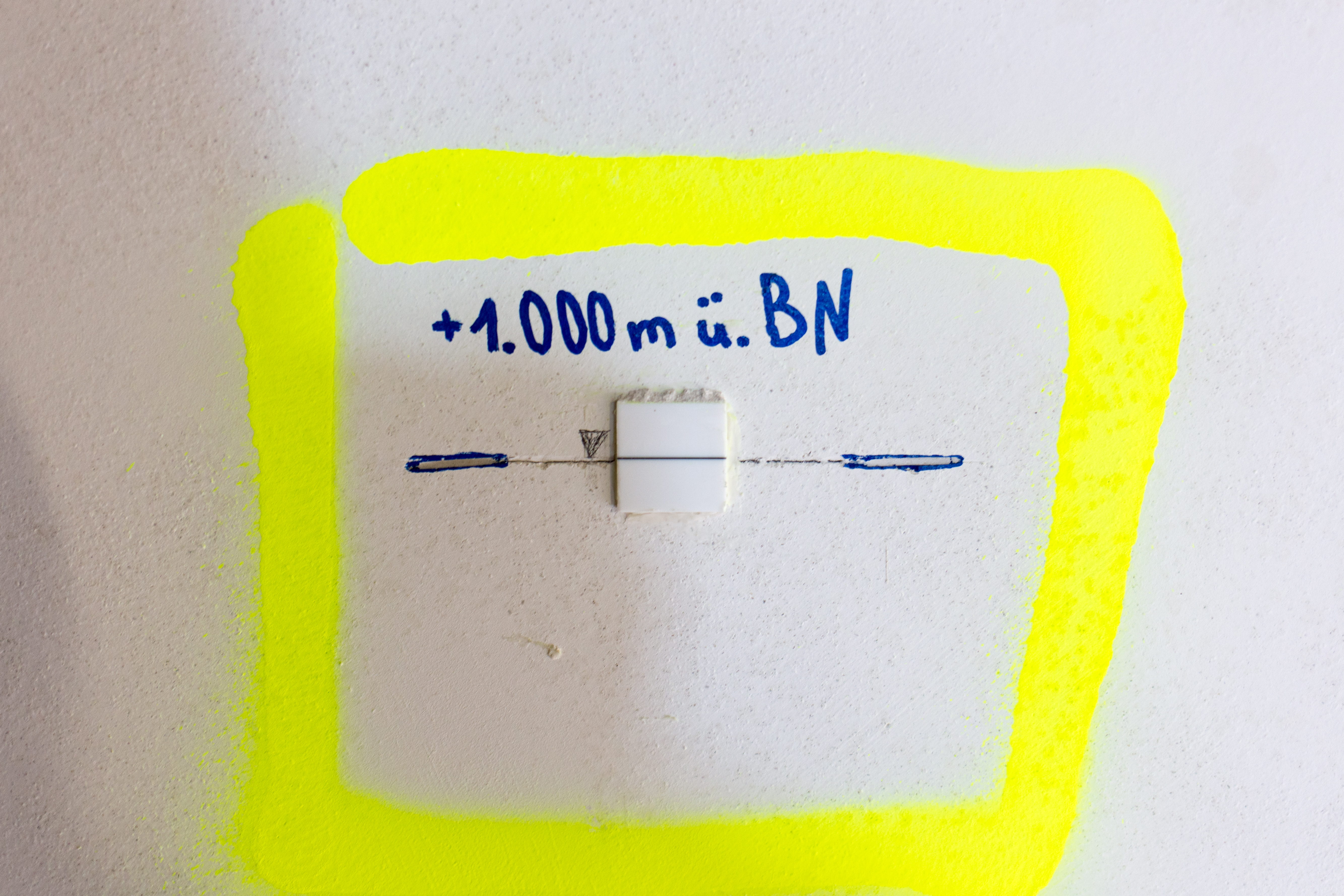 Wikipedia KulTour im Humboldt Forum